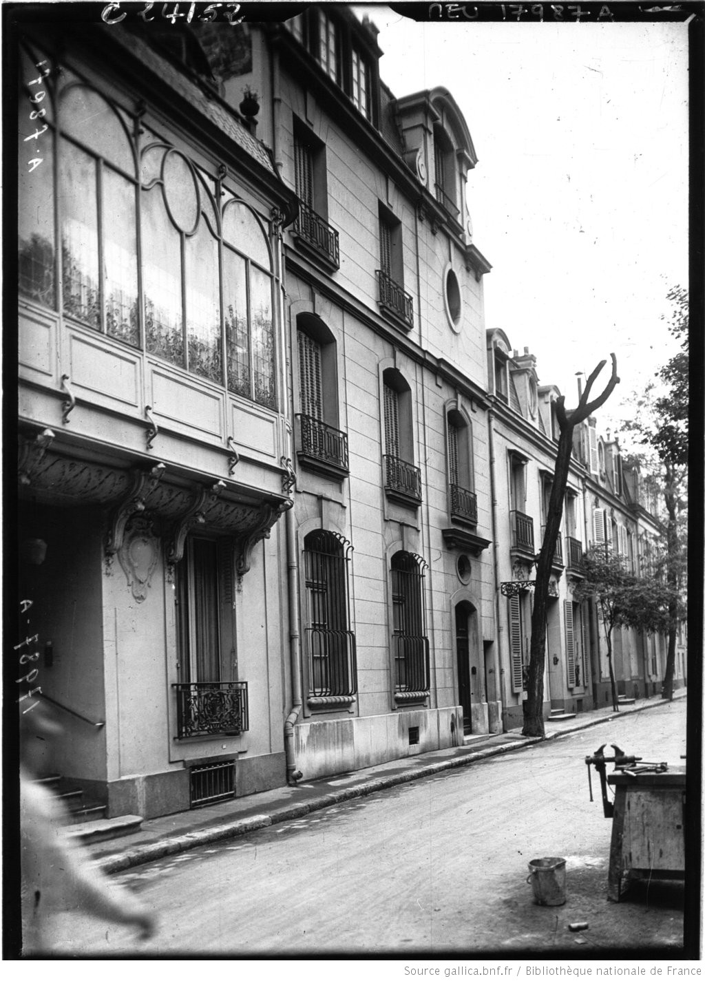 Maison d'Anatole France, villa Saïd, Paris (Source / Bibliothèque nationale de France). Photo de 1924.